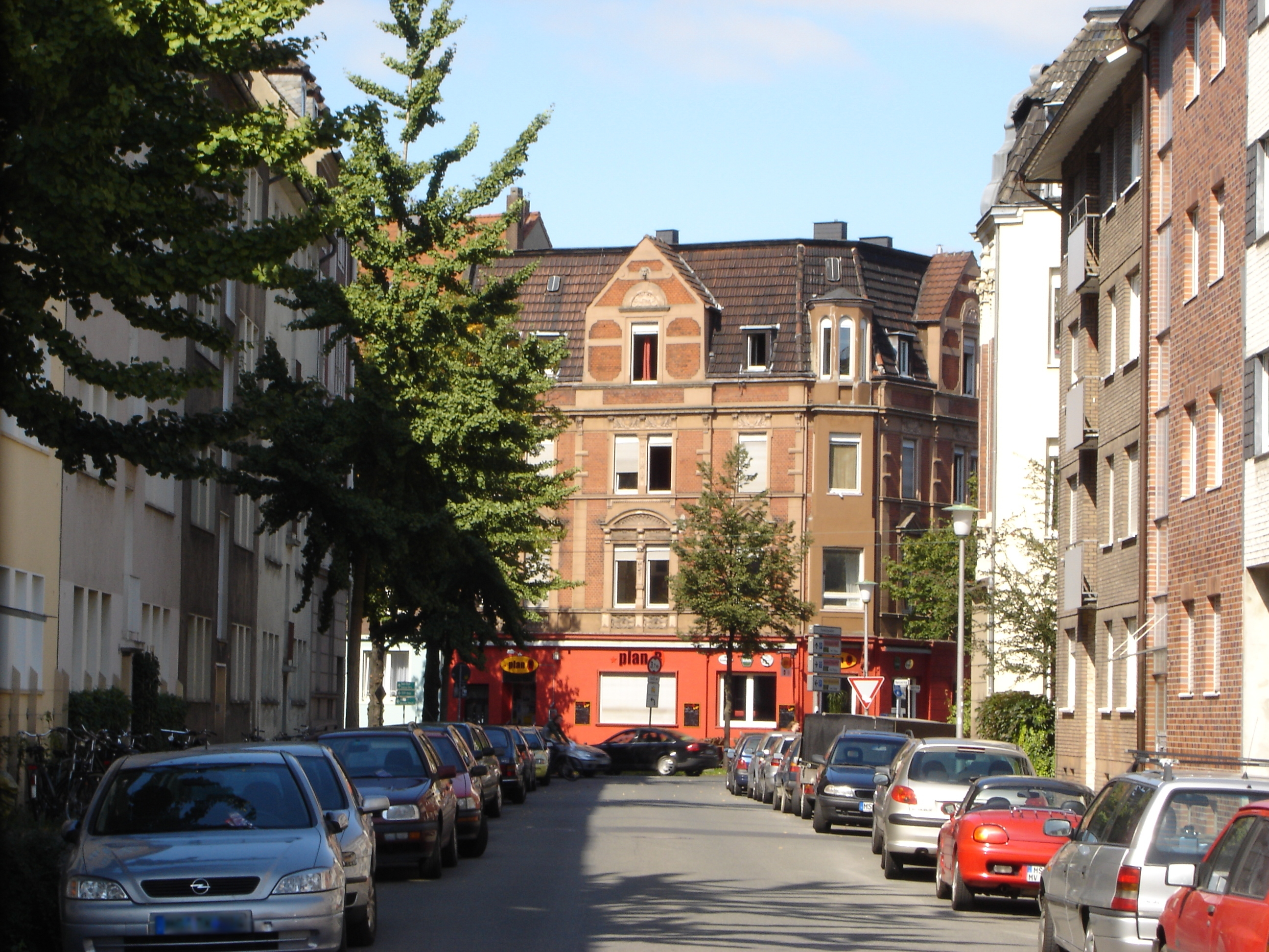 Panorama der Soester Straße im Hansaviertel, Münster, Deutschland